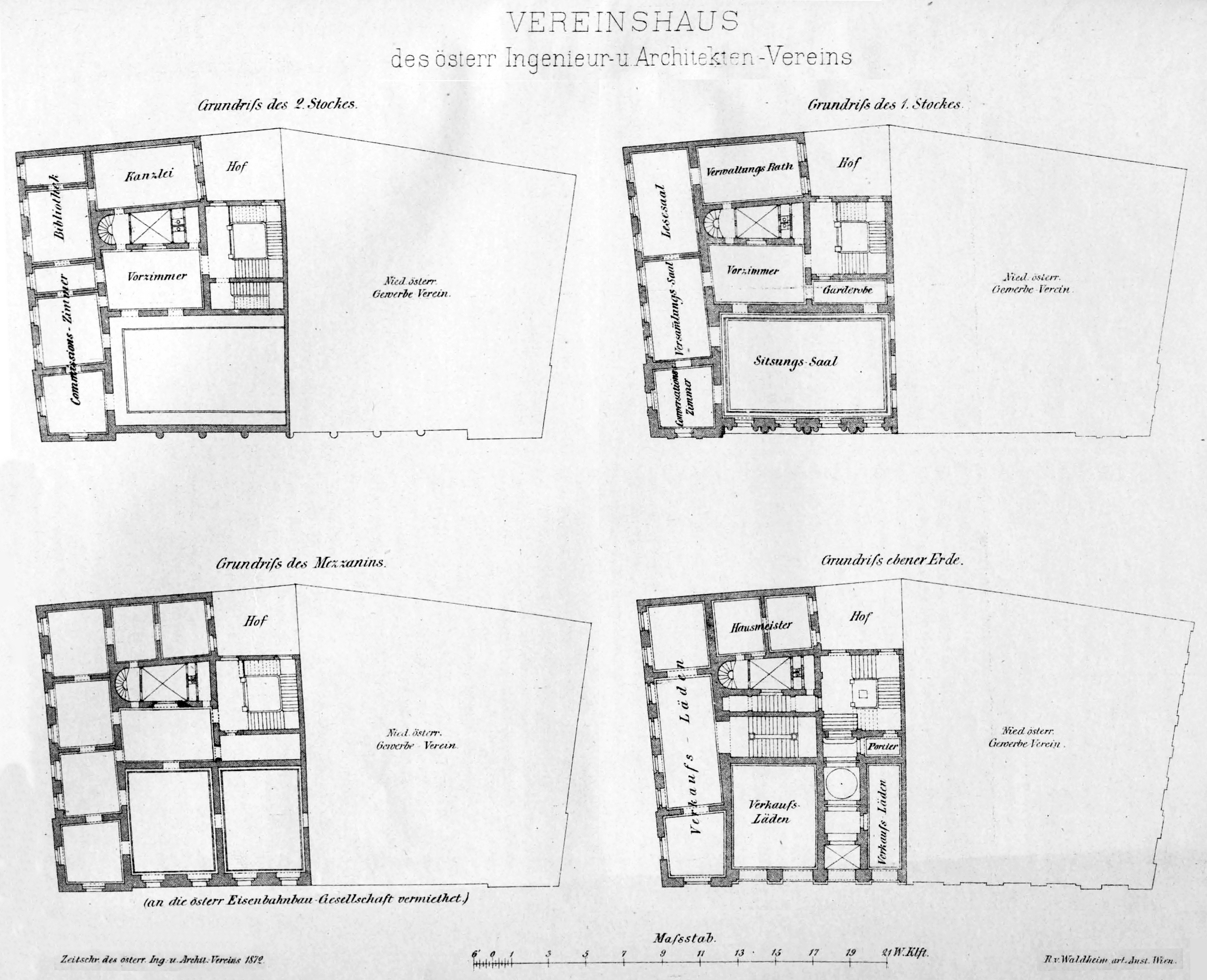 Vereinshaus des Österreichischen Ingenieur- und Architekten-Vereins, Wien, Eschenbachgasse 11, Grundrisse